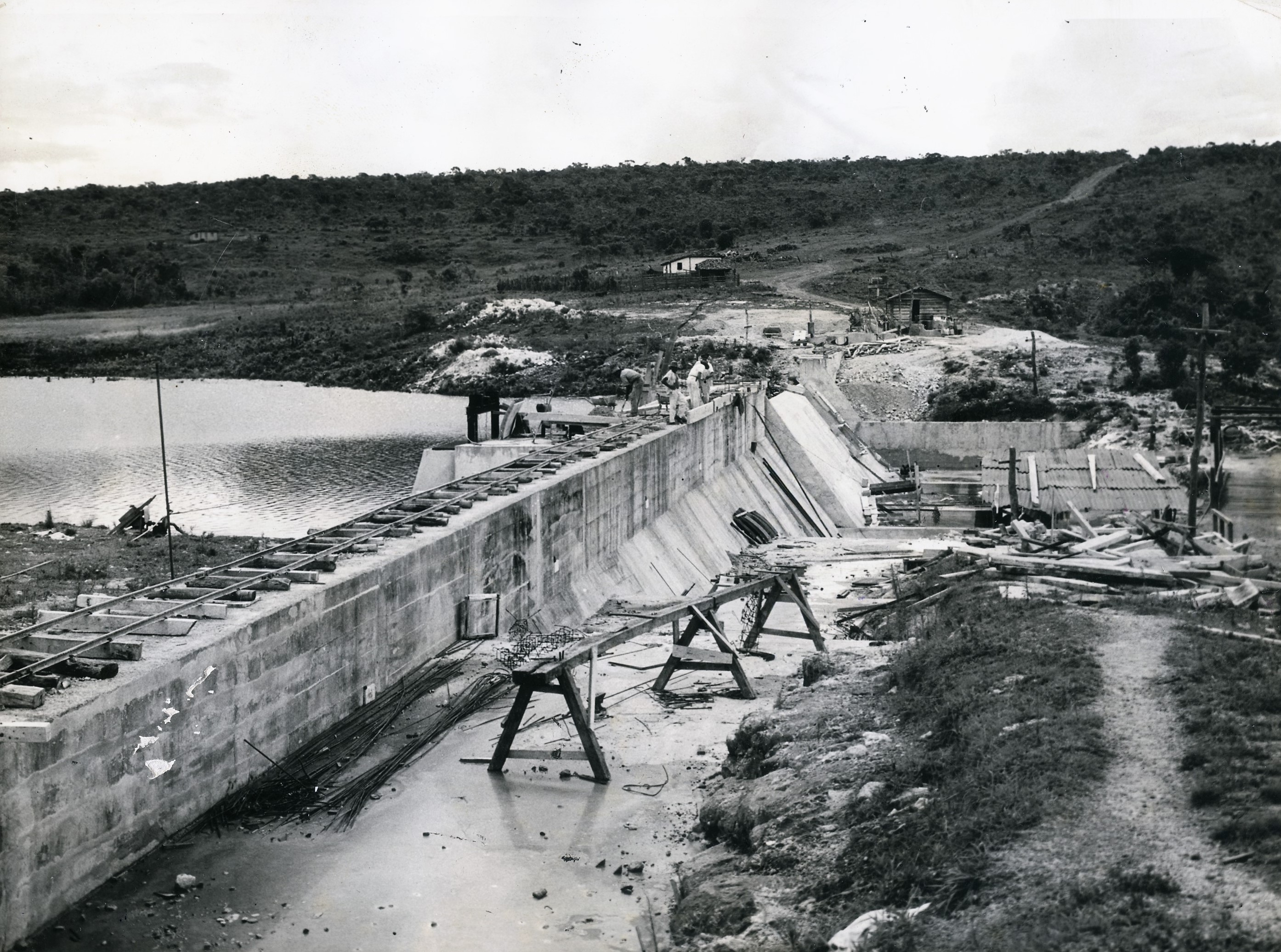 Fotografia do Fundo Correio da Manhã, sob a guarda do Arquivo Nacional.